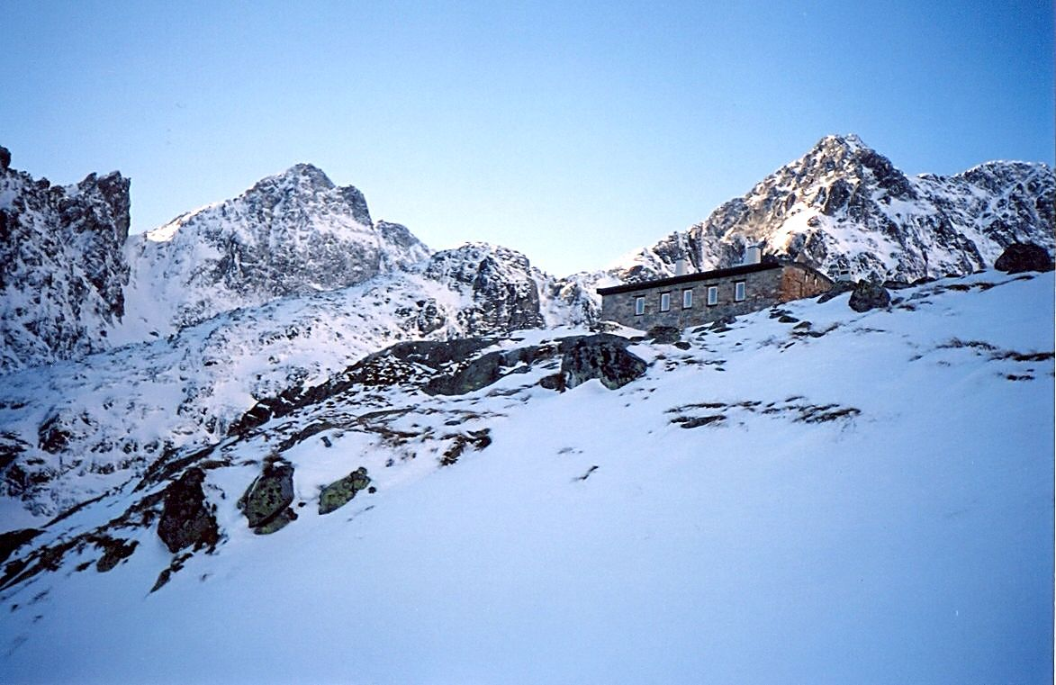 Magas-Tátra Téry Ödön mh Беларуская (тарашкевіца): Хата Тэры ў Высокіх Татрах.